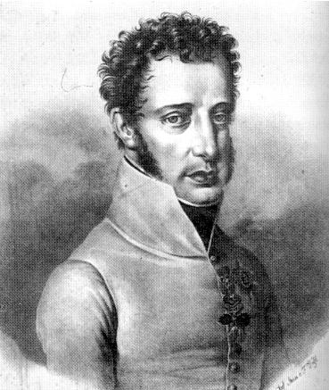 Portrait of Ludwig von Habsburg-Lothringen (1784–1864)